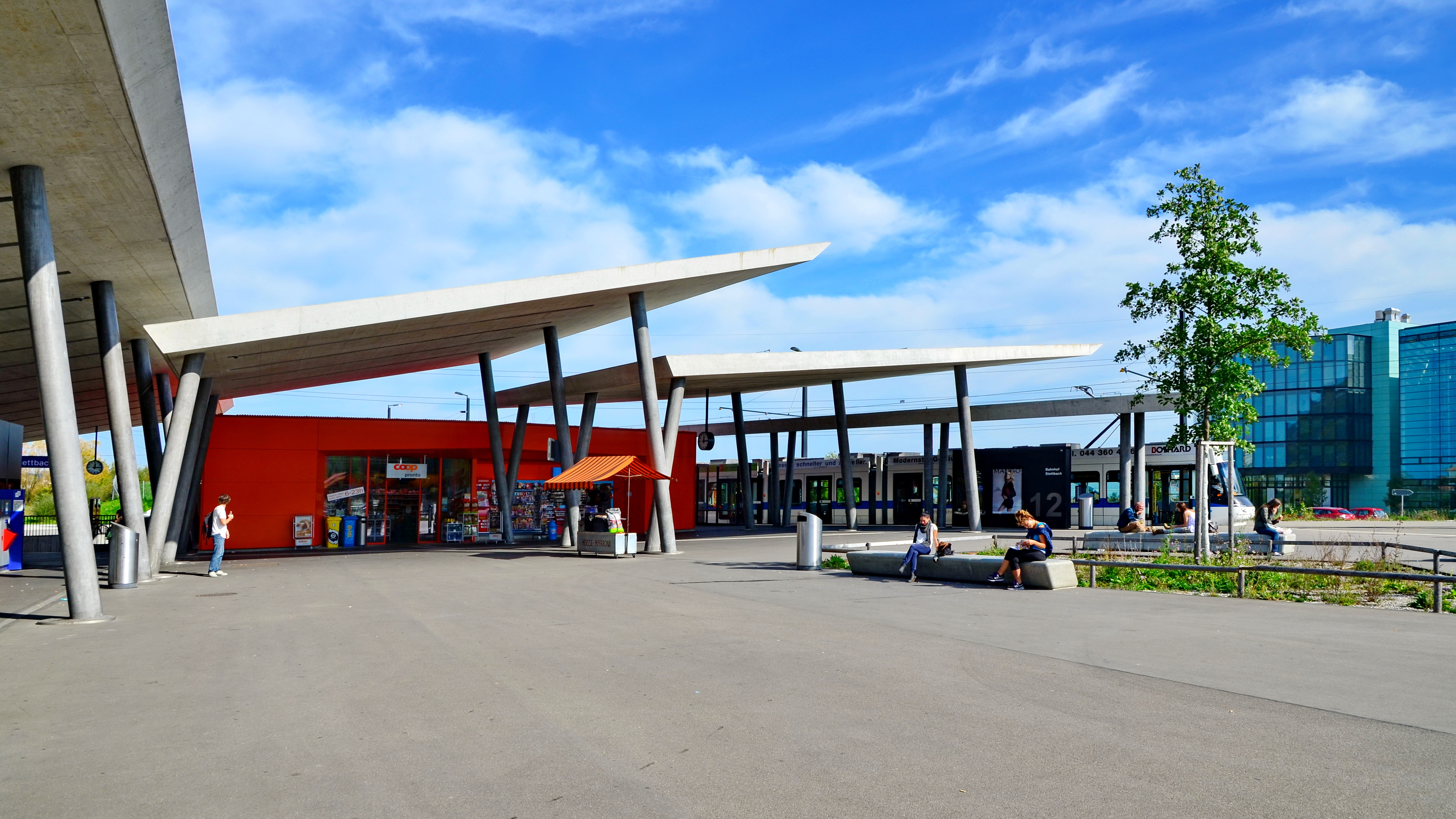 Bahnhof Stettbach in Zürich-Stettbach (Switzerland)